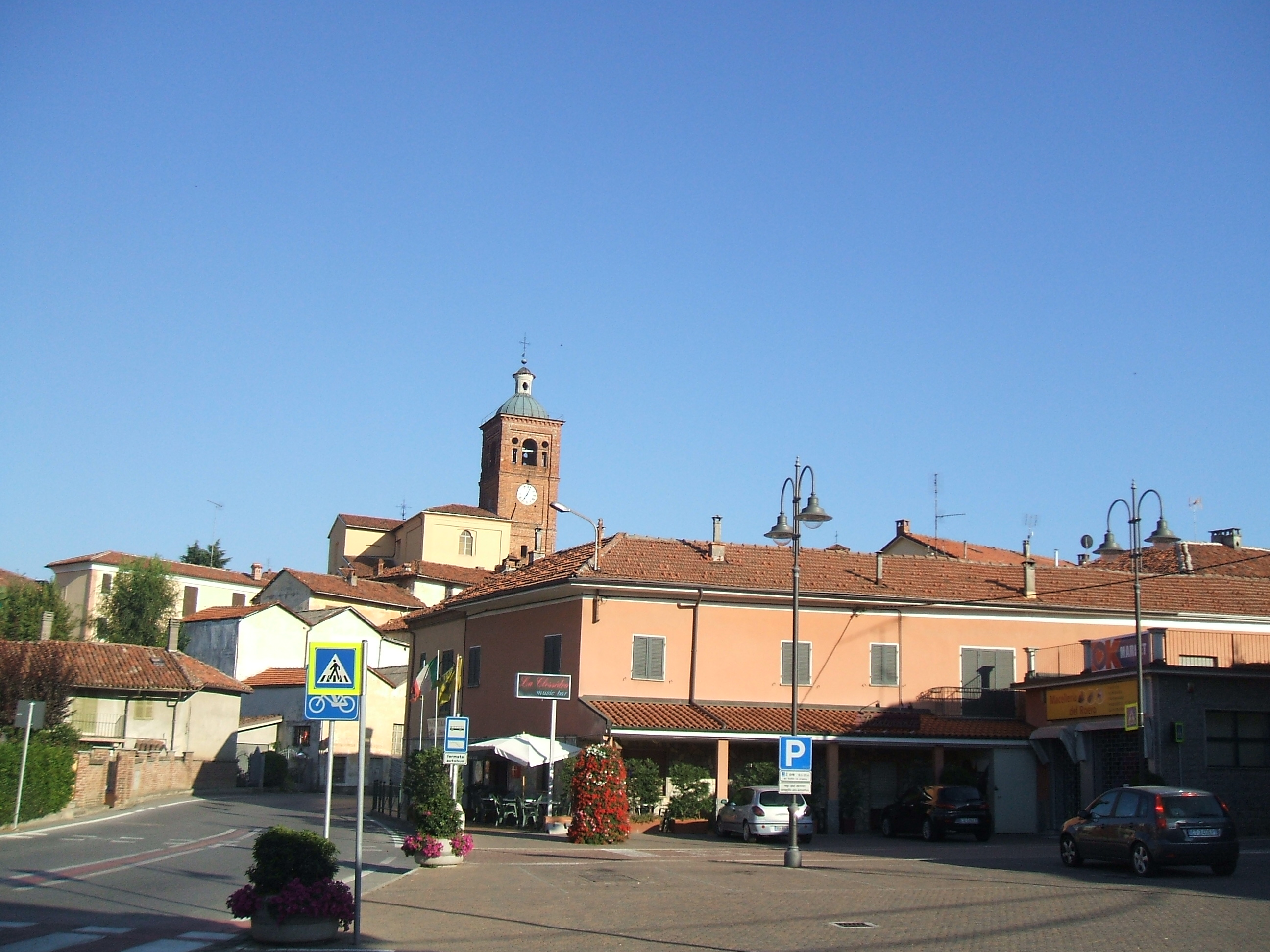 Sommariva Perno, province of Cuneo, Italy